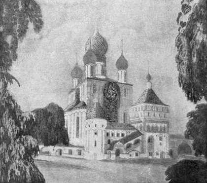 Строящийся Фёдоровский собор в Санкт-Петербурге.